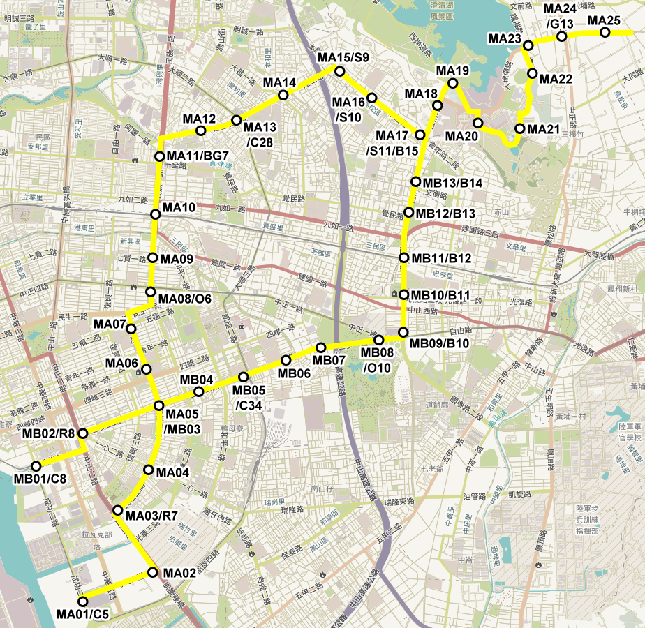 高雄捷運 輕軌黃線 2016年頃規劃